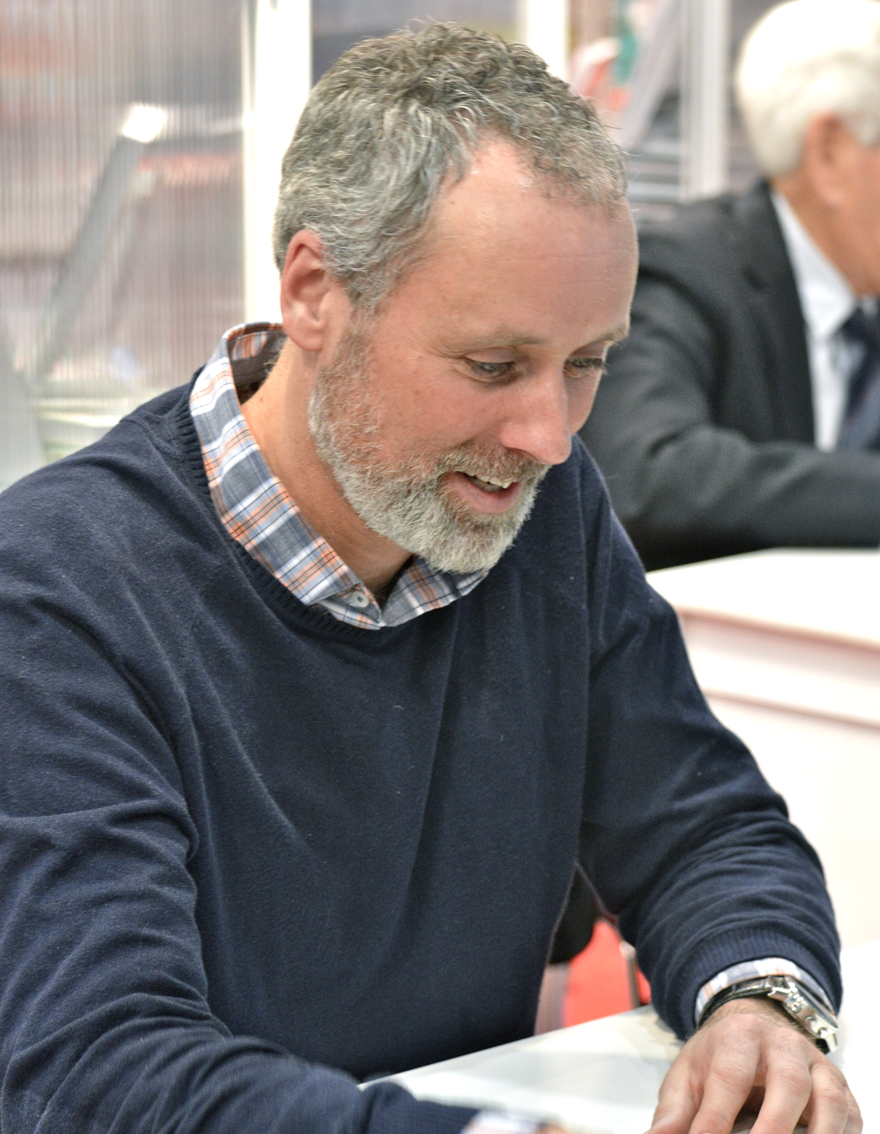 Vincent Marissal au Salon international du livre de Québec 2015